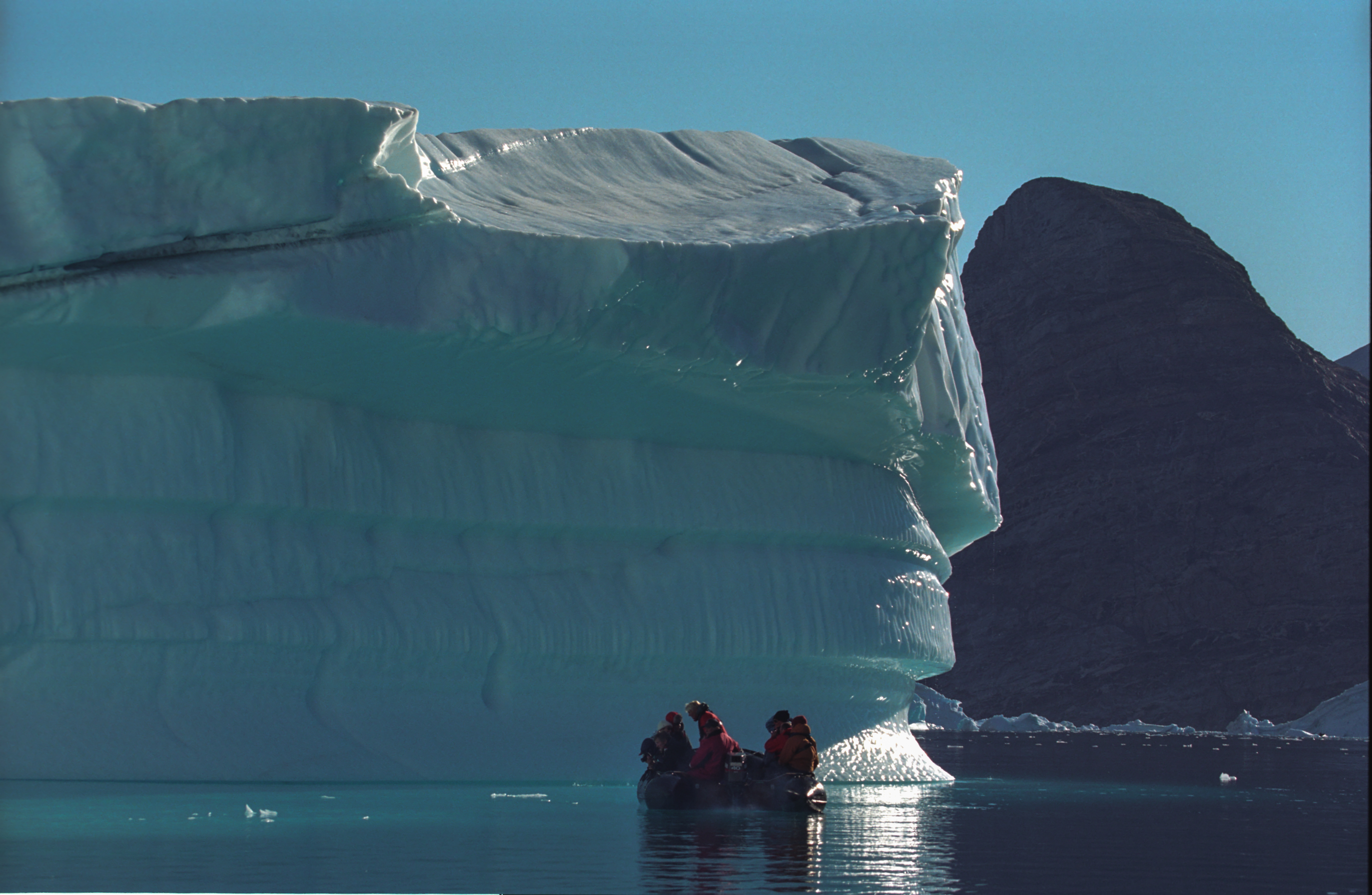 Greenland, Rype Fjord, Iceberg